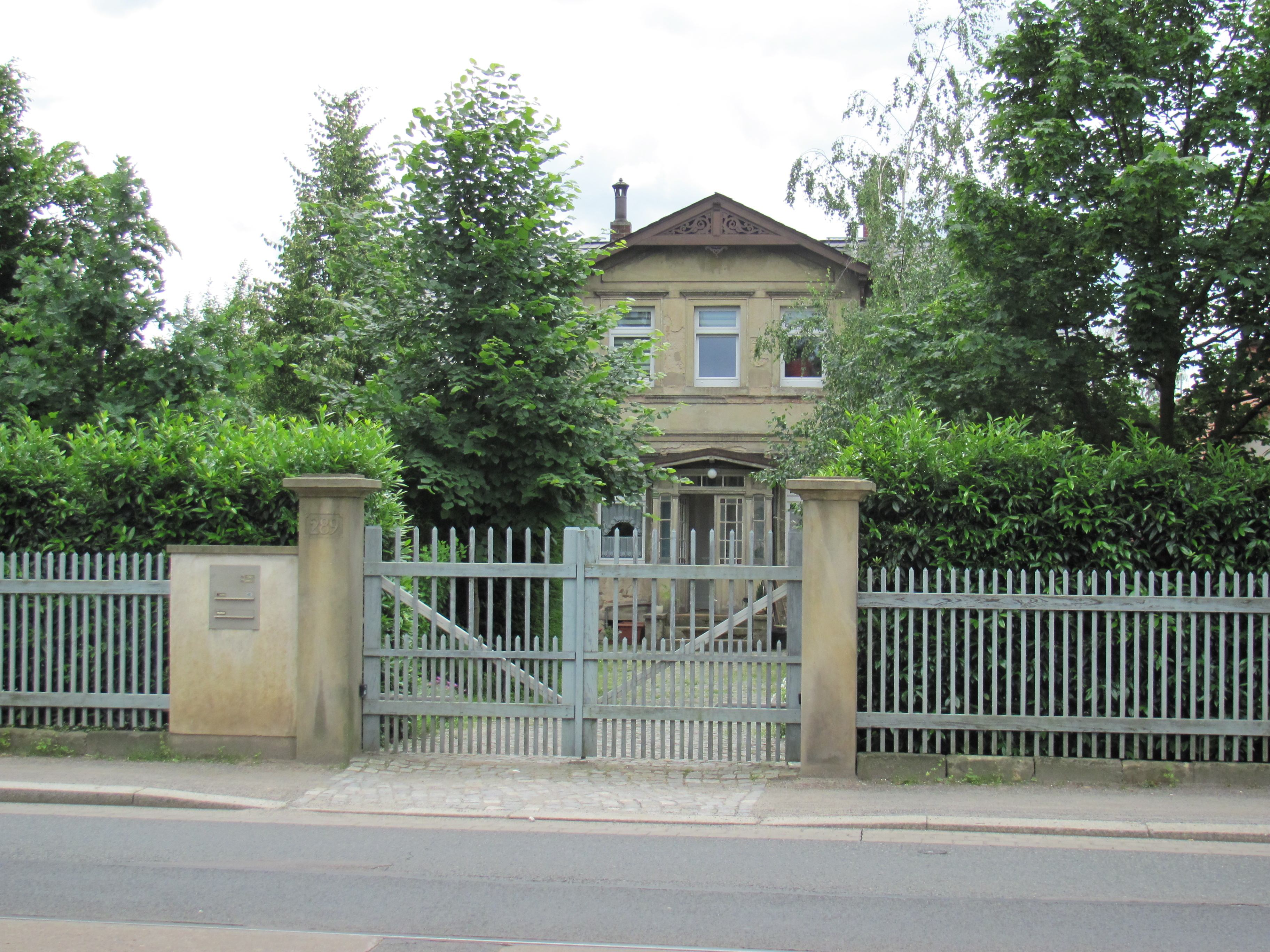 Radebeul-Kötzschenbroda, Villa Carl Traugott Schubert sen.